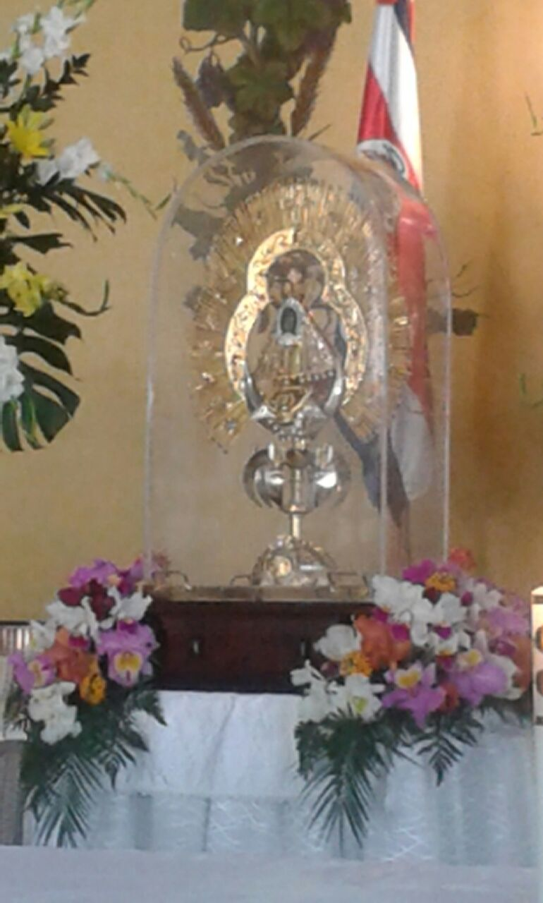 Pasada de la Negrita en Cartago, 6 septiembre de 2014. Costa Rica.